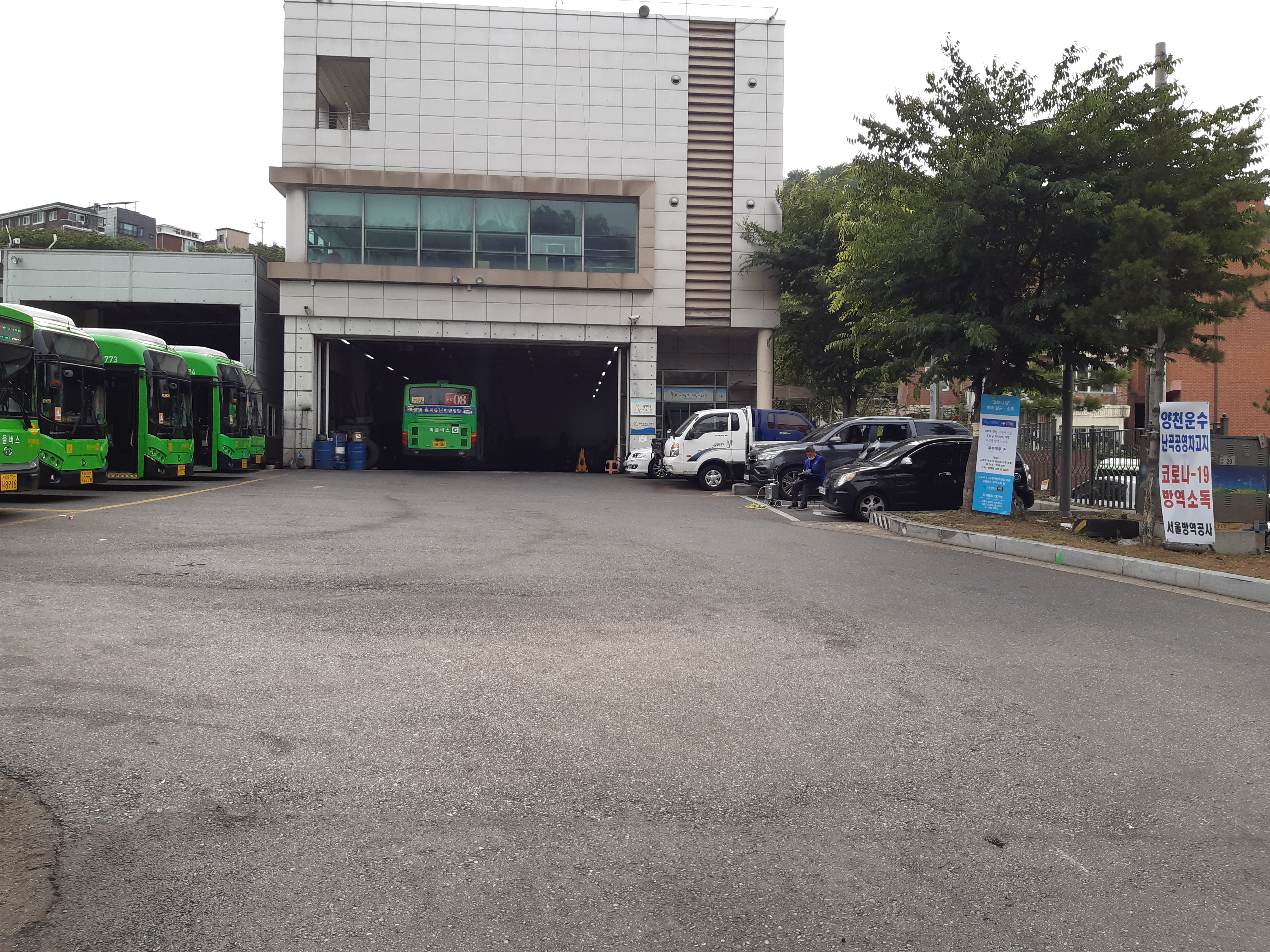 양천운수 난곡동 차고지